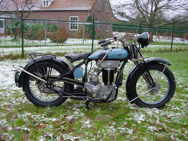 Toestemming van Yesterdays Antique Motorcycles